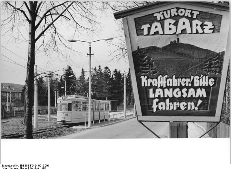 Tabarz, Thüringerwaldbahn, Hinweisschild Zentralbild Demme 24.4.1967 Erfurt: Thüringerwaldbahn für den Urlaubsverkehr gerüstet. Ein Zug der Thüringerwaldbahn verläßt Tabarz in Richtung Friedirchroda. Moderne Gelenkzüge, Trieb- und Beiwagen aus der Produktion des VEB Waggonbau Gotha bestimmen den hohen Fahrkomfort der Bahn, die zu den ältesten deutschen Überlandstraßenbahnen zählt. In Vorbereitung des Urlauberverkehrs 1967 wurden sämtliche Wichen erneuert und große Streckenabschnitte rekonstruiert. Allein 1966 legten die Bahnen auf der 21,7 Kilometer langen Strecke, die von Gotha nach Waltershausen, Friedrichroda und Tabarz führt, 1,4 Millionen Kilometer zurück. [Hinweisschild "Kurort Tabarz. Kraftfahrer! Bitte langsam fahren!"]